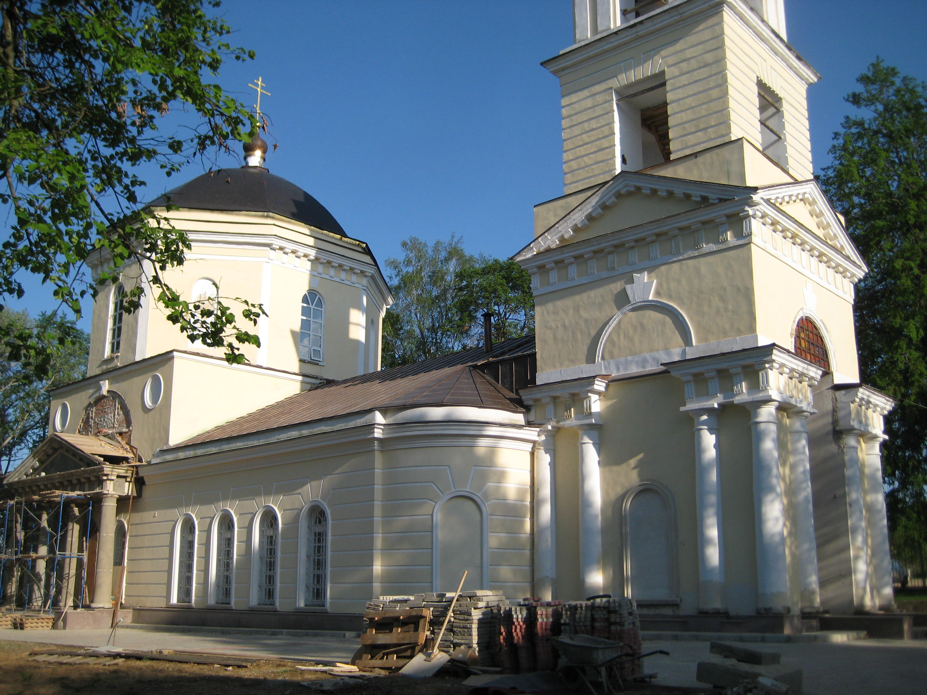 Церковь Успения Богородицы, Истомино